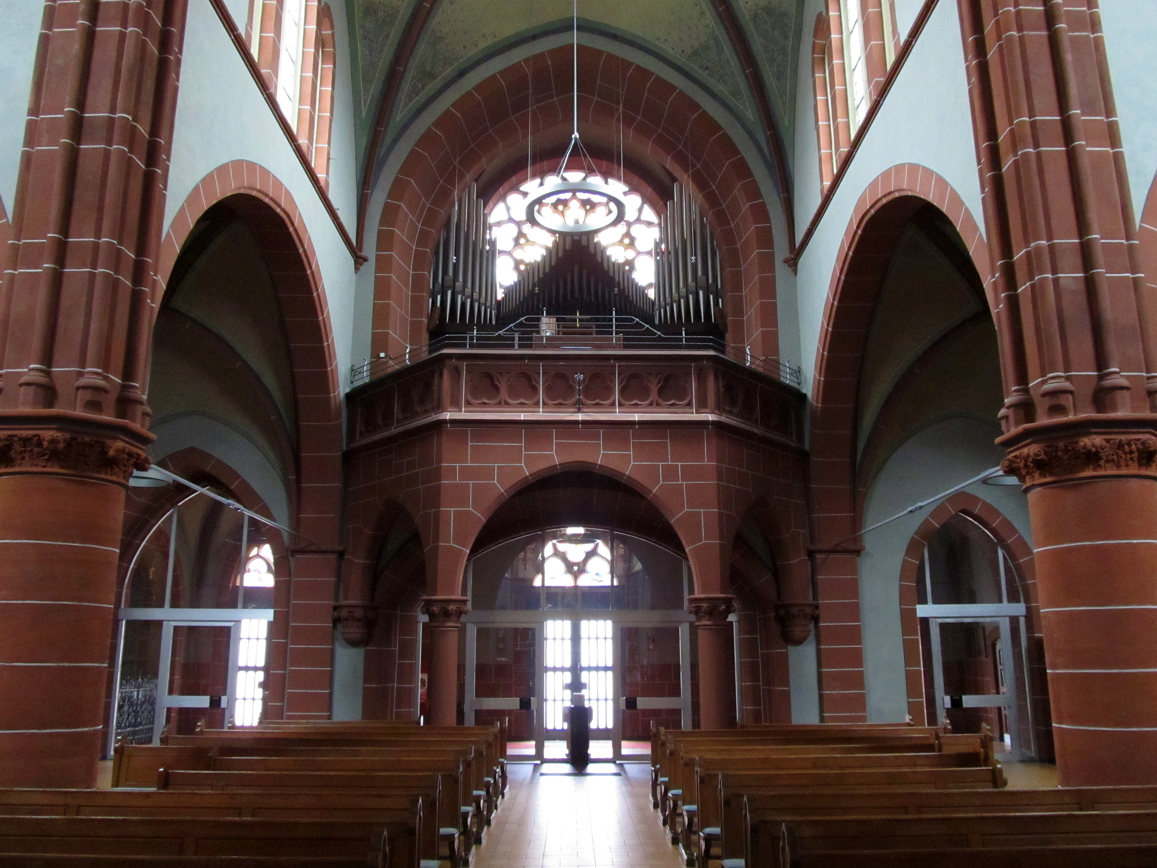 Blick ins Innere der katholischen Pfarrkirche St. Josef in Bildstock, einem Stadtteil von Friedrichsthal (Saar), Regionalverband Saarbrücken, Saarland